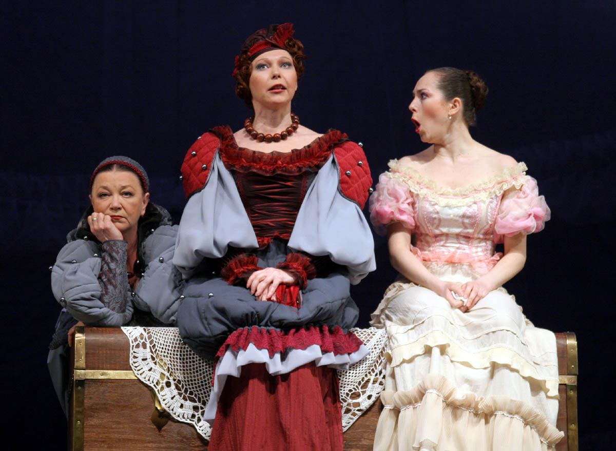 Сцена из спектакля Саратовского академического театра драмы «Женитьба». Лариса Уварова (Арина Пантелеймоновна), Любовь Воробьёва (Фёкла Ивановна), Татьяна Родионова